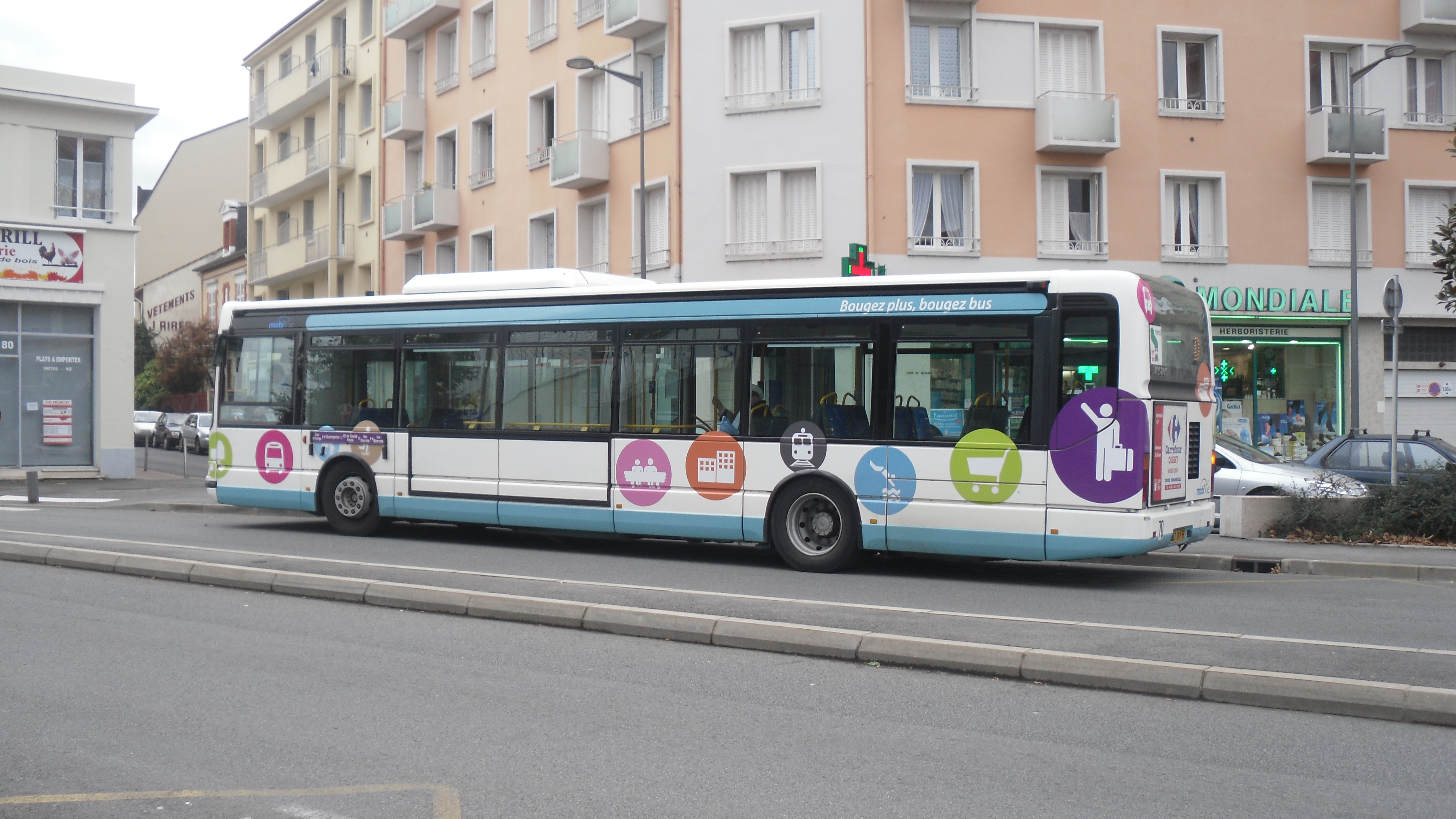 Irisbus Agora ligne D à l'arrêt du Marché Couvert.